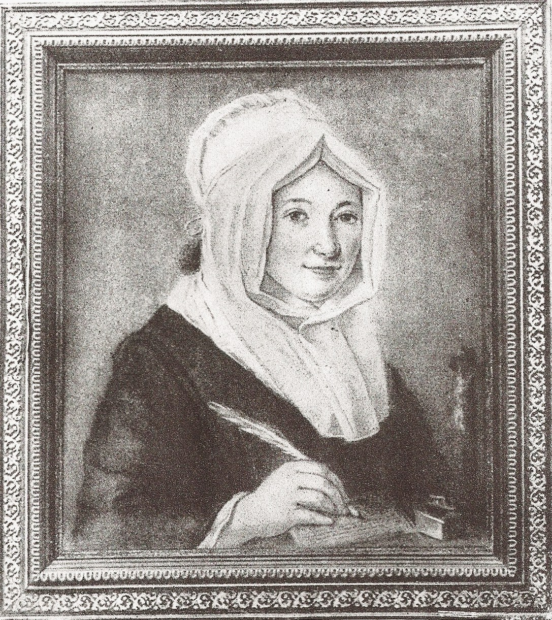 Victoire Conen de Saint-Luc (autoportrait)